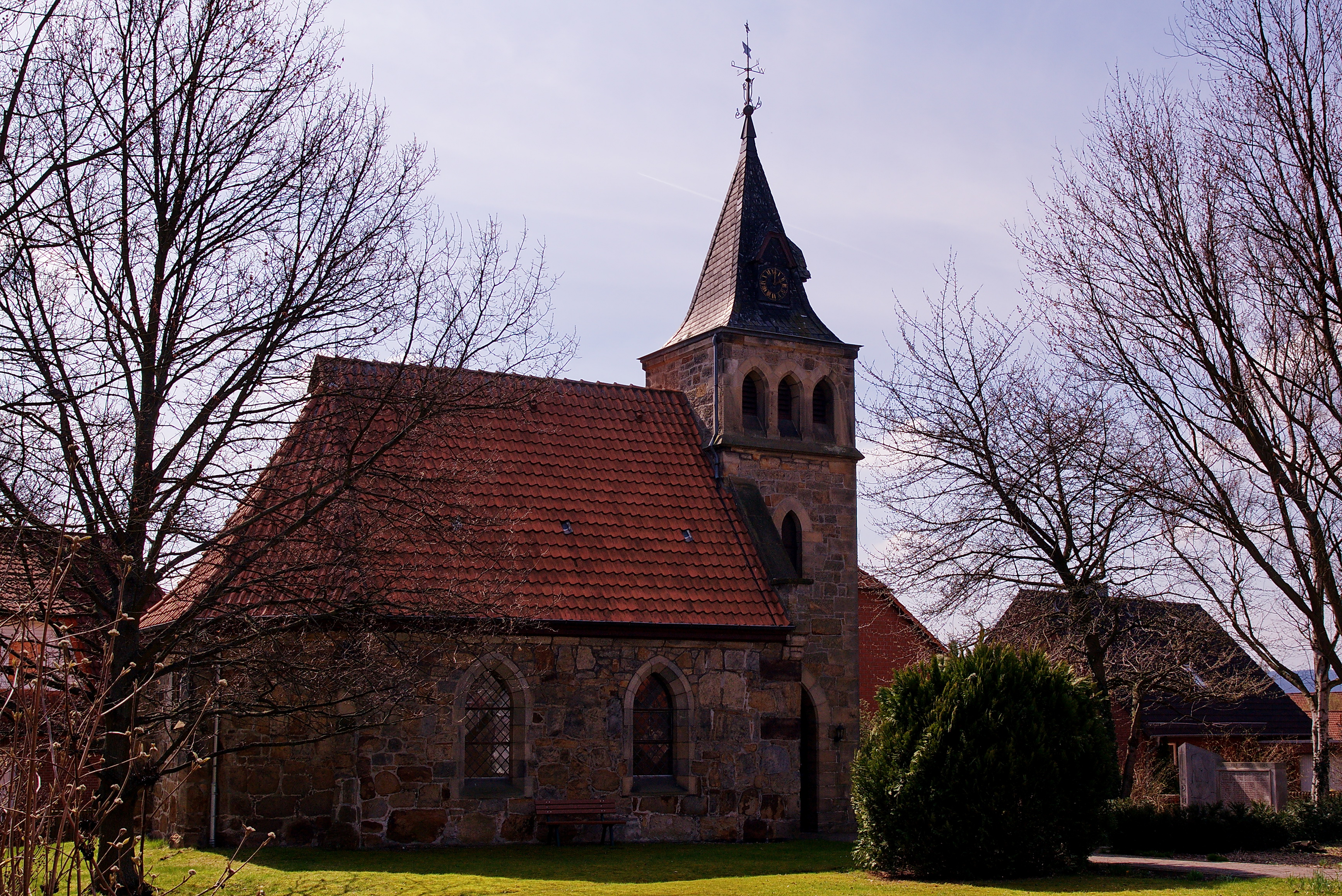 Kapelle in Sorsum (Wennigsen), Niedersachsen, Deutschland